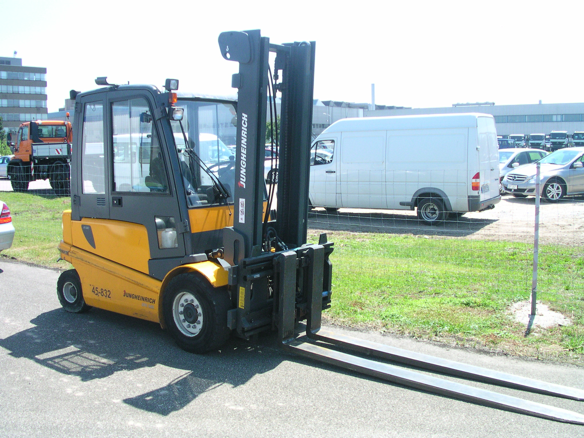 Jungheinrich Gabelstapler mit langen Gabeln in Wörth am Rhein beim Oldtimer-Treffen bei Daimler-Chrysler, zwar kein Oldtimer, aber im aktuellen Programm des Herstellers nicht zu finden, daher kann ich keine näheren Angaben machen